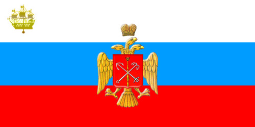 Флаг Ленинграда в соответствии со Статьей 10.3 Решения №30 «Проекта временного государственного устава Ленинграда» от 28 июня 1991 г.